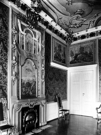 Schwarzer Adlersaal im Schloss